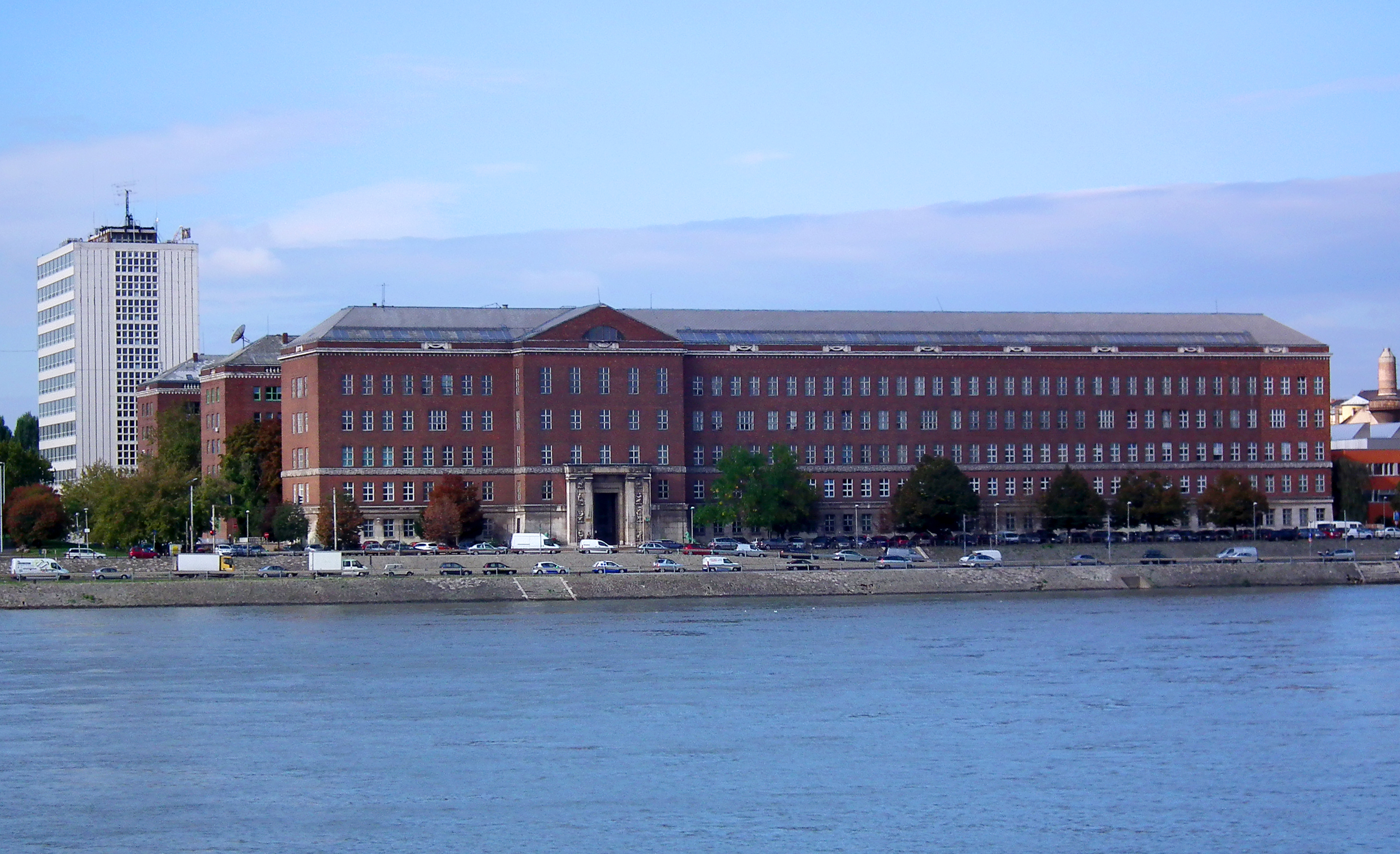 Budapesti Műszaki Egyetem R épülete